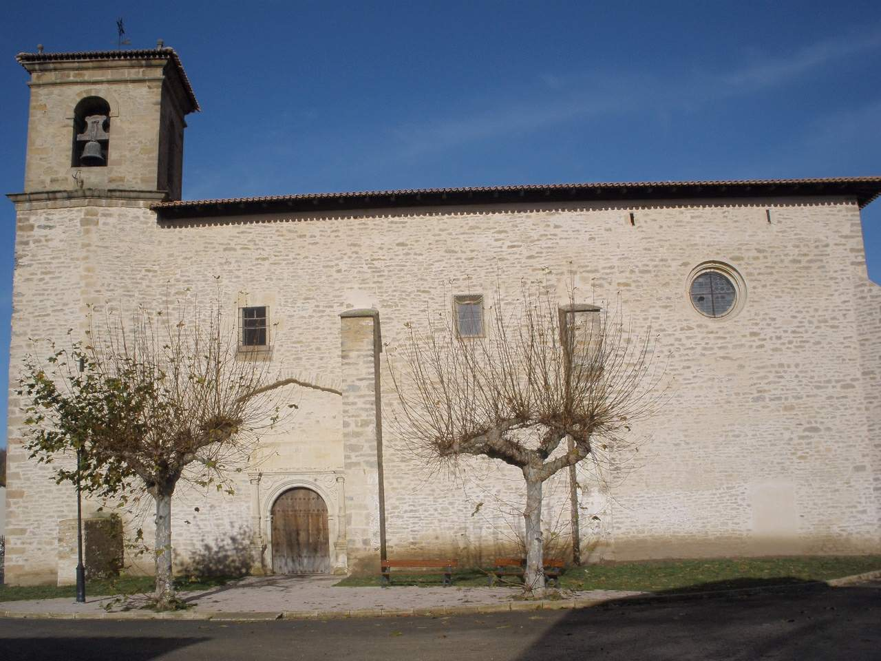 Villafranca (Álava), Iglesia de San Andrés